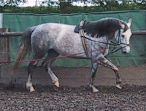 Wakira